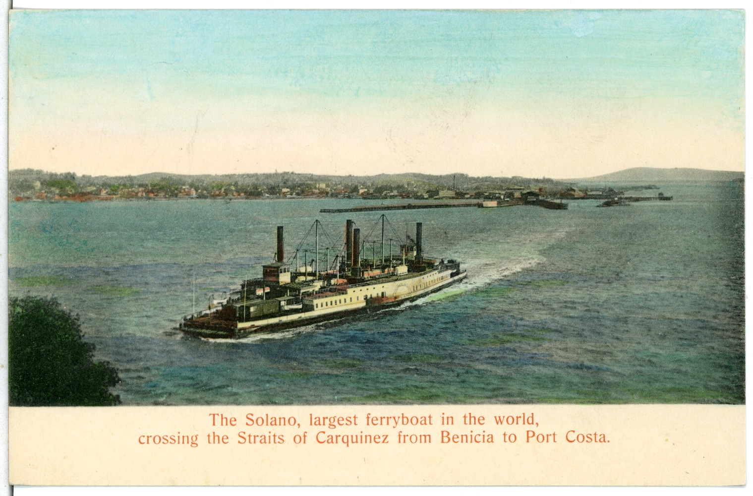 Benicia; The Solano, largest ferryboat in the world This postcard is from publisher Brück & Sohn in Meißen ( postcard has a unique number 06901 and is available in a higher resolution at the publisher. This images was uploaded in a cooperation project between Wikipedians and the publisher.